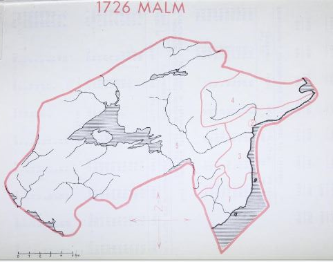 Kart over Malm kommune med dens utstrekning 1913-1963. Tellingskretser ved folketellingen i 1960: 1: Vada, 2: Malm, 3: Ressem, 4: Tverås, 5: Ystmark